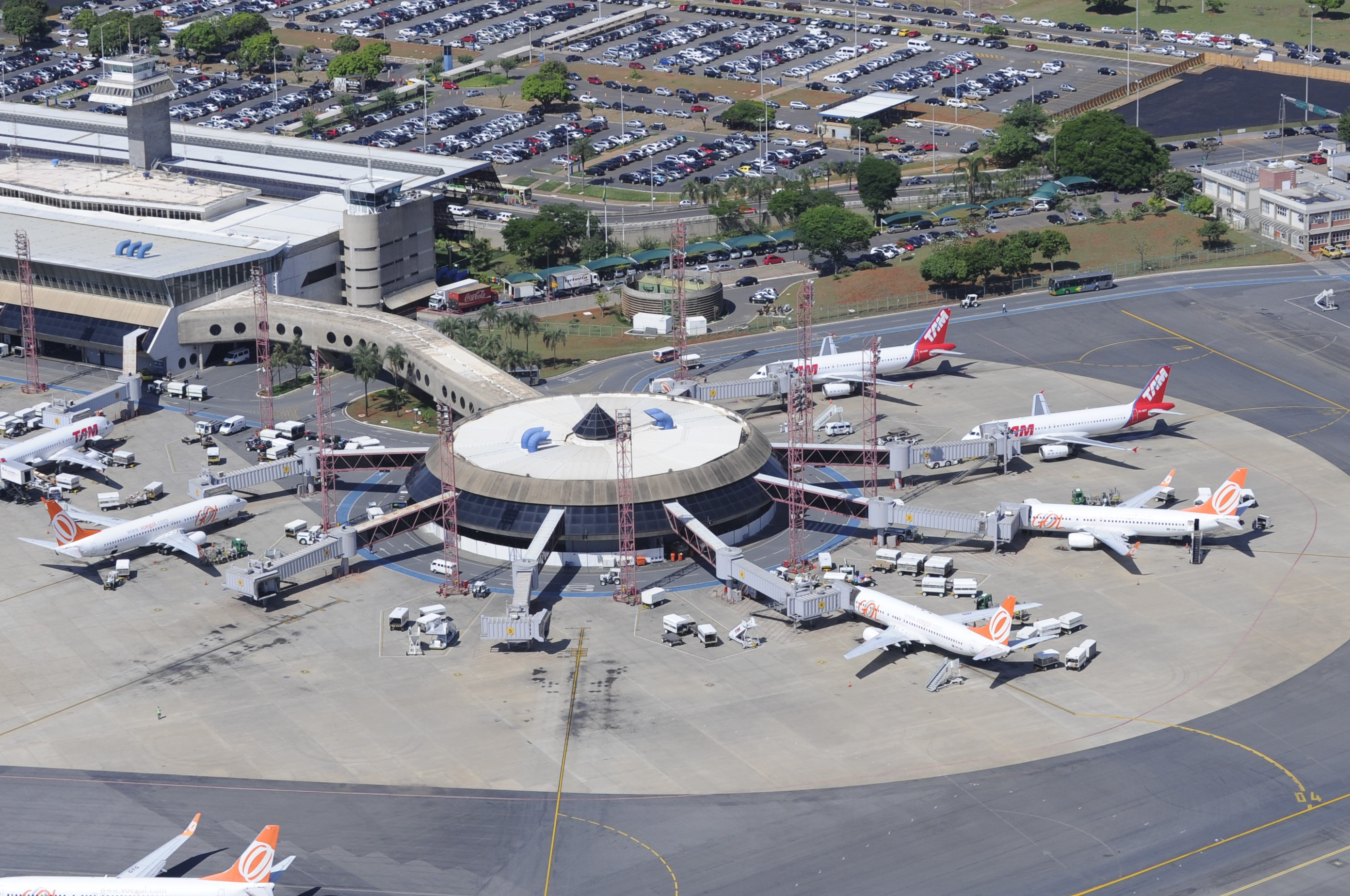 Vista aérea do Aeroporto Internacional de Brasília - Juscelino Kubitschek. Foto: Geraldo Magela/Agência Senado